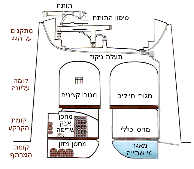 Martello tower diagram